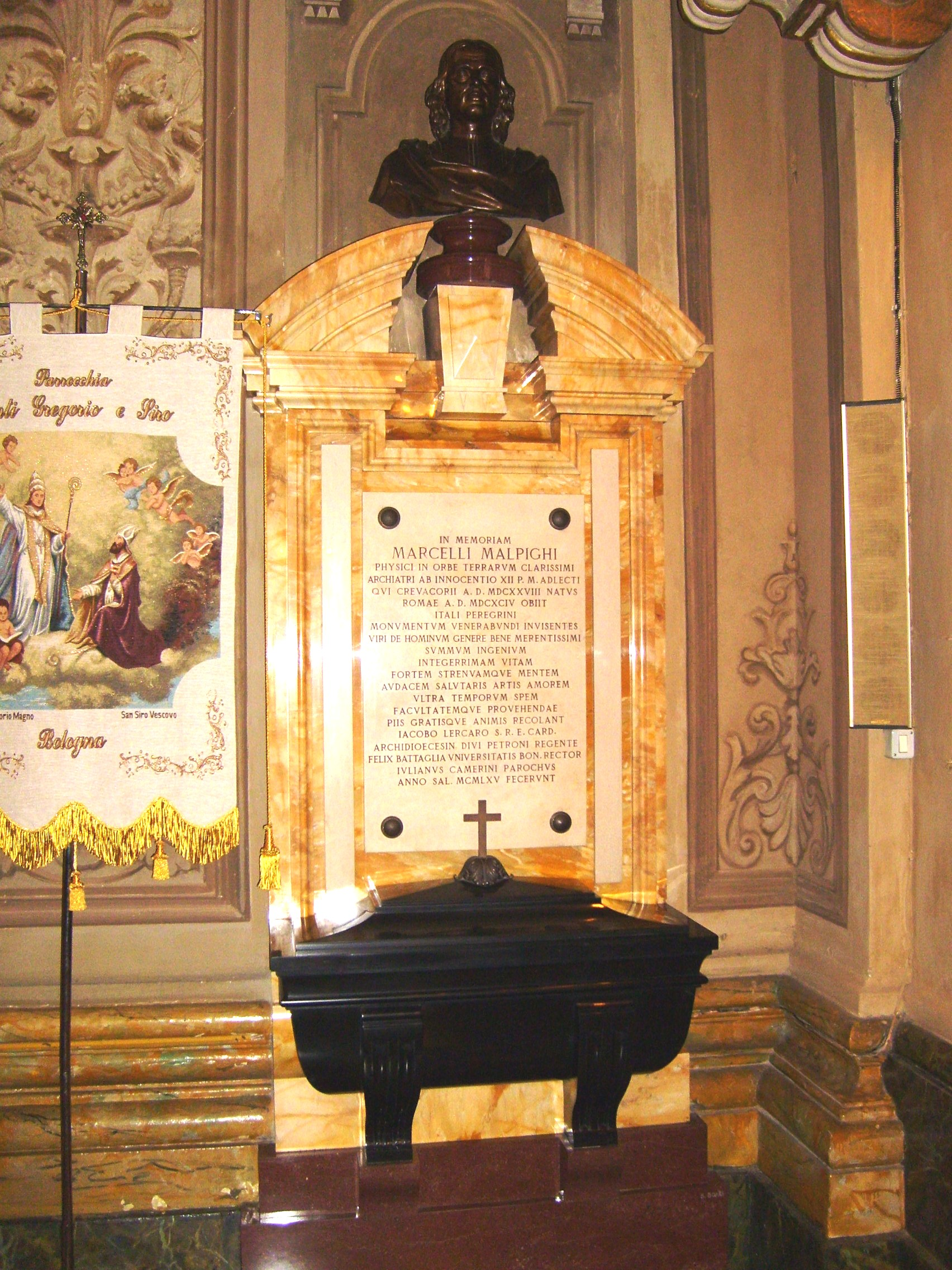 Marcello_Malpighi's tomb, Church of Santi Gregorio e Siro, Bologna, Italy